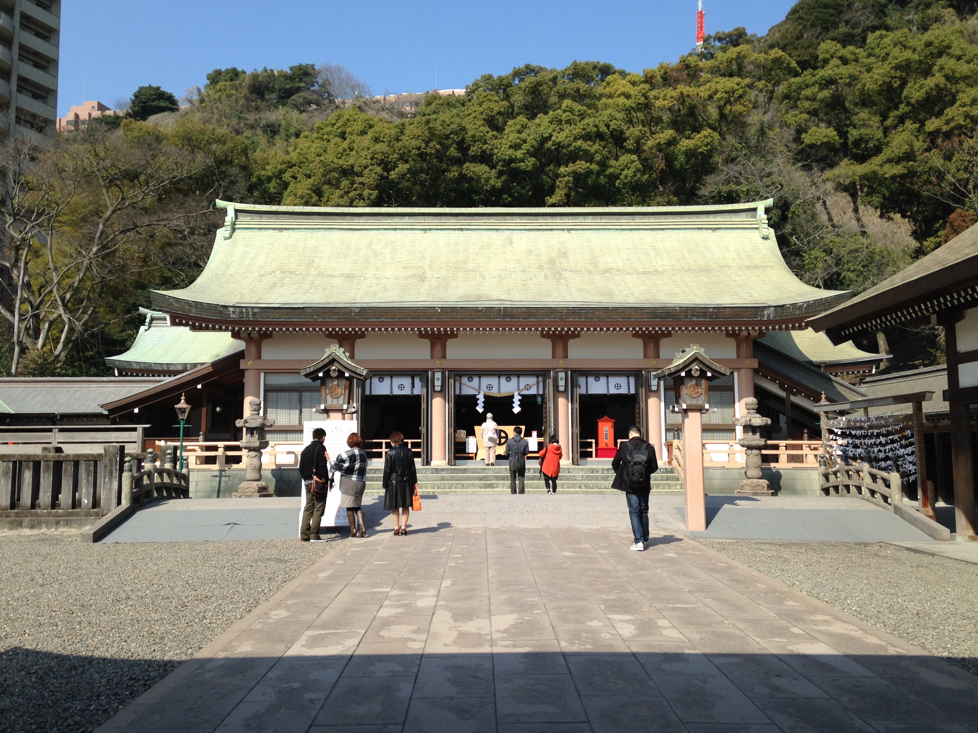 照国神社の拝殿